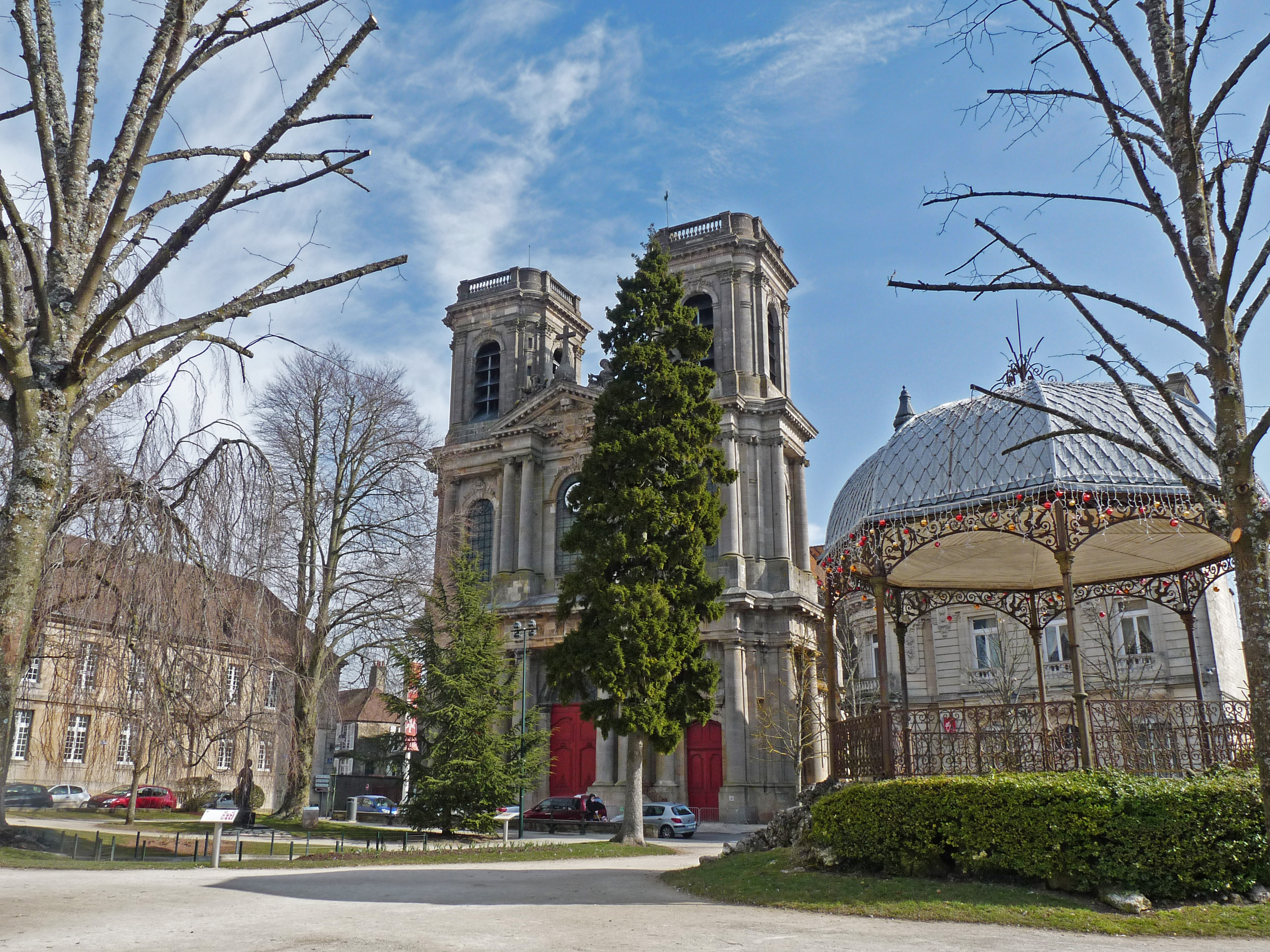 Place Jeanne Mance à Langres (Haute-Marne). Le monument dédié à Jeanne Mance en 1968 à gauche au bord du bassin. La cathédrale Saint-Mammès. Le kiosque à musique